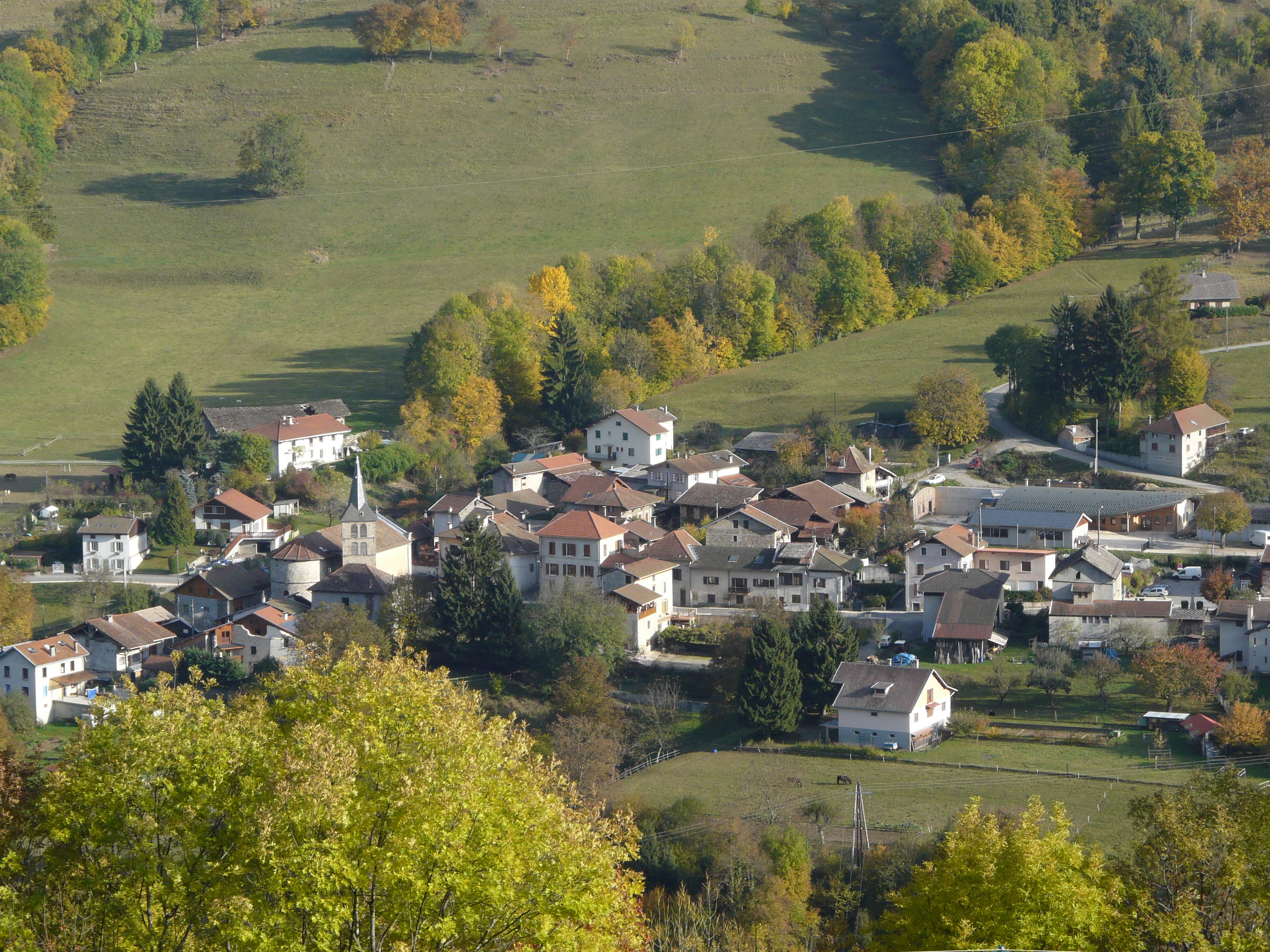 La Chapelle-du-Bard en octobre 2009